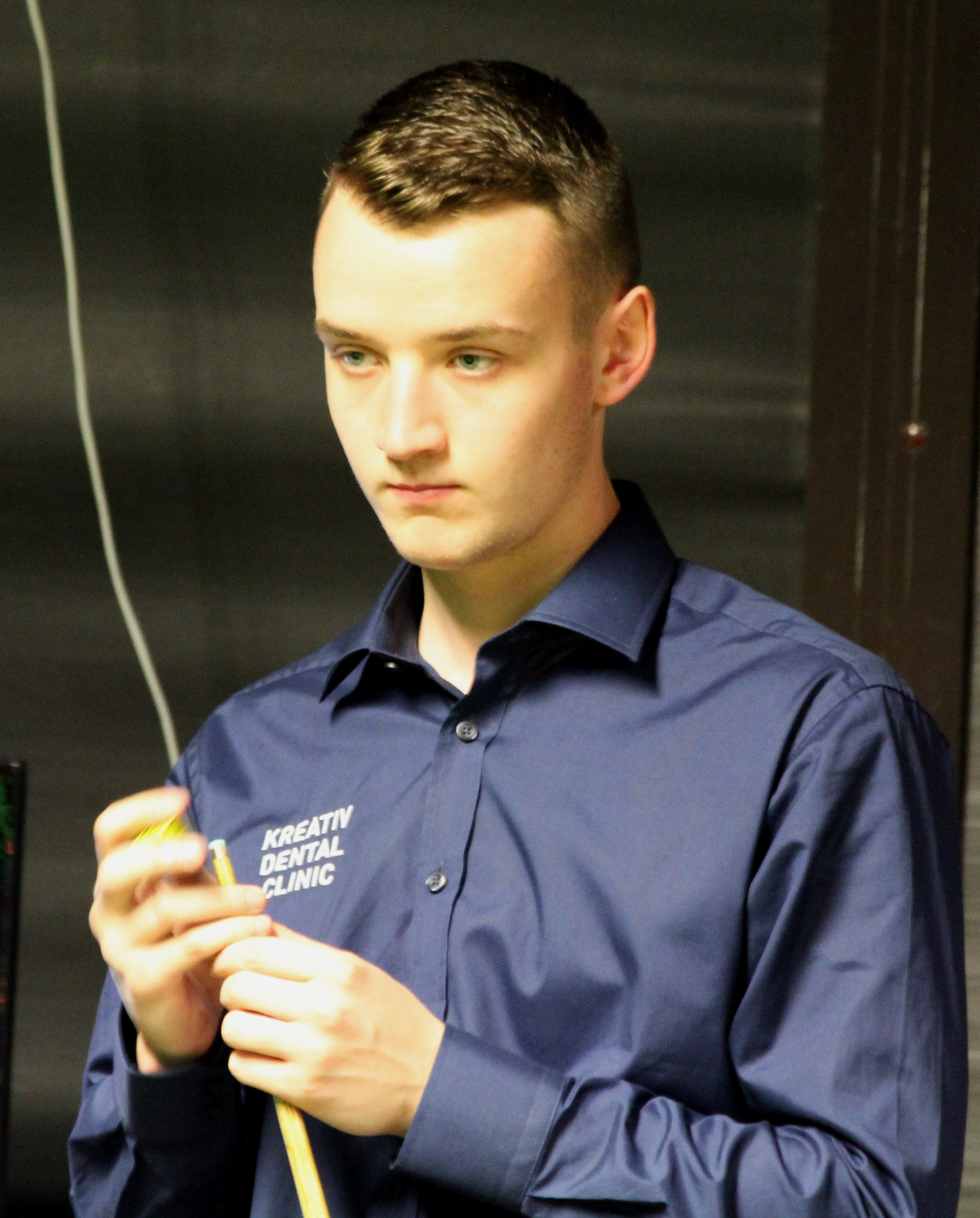 Sam Craigie beim Paul Hunter Classic 2015